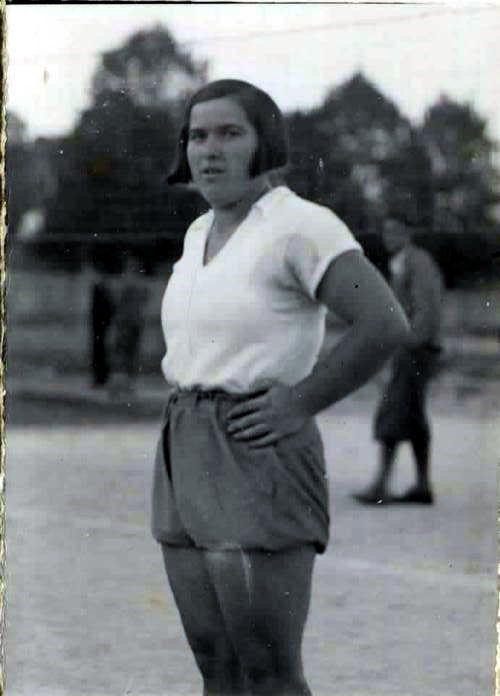 Fanči Bernik (1906-1965), Slovene athlete.